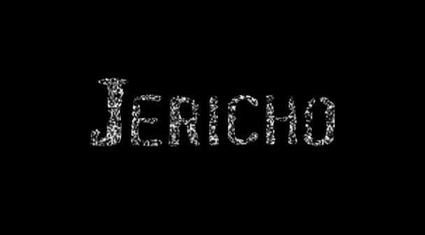 Screenshot des Jericho-Logos